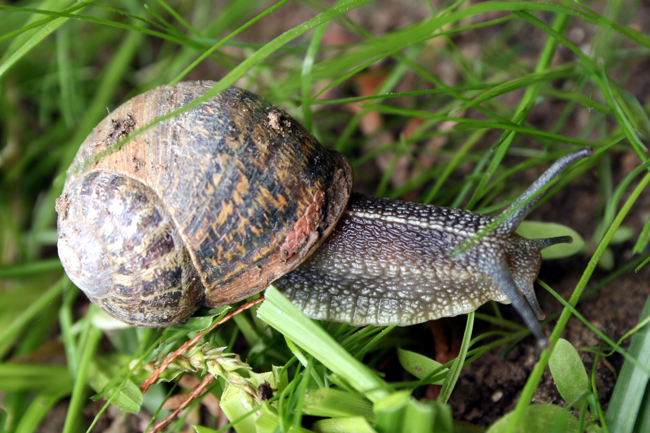 Un escargot dans mon jardin par ce mois de juillet pluvieux